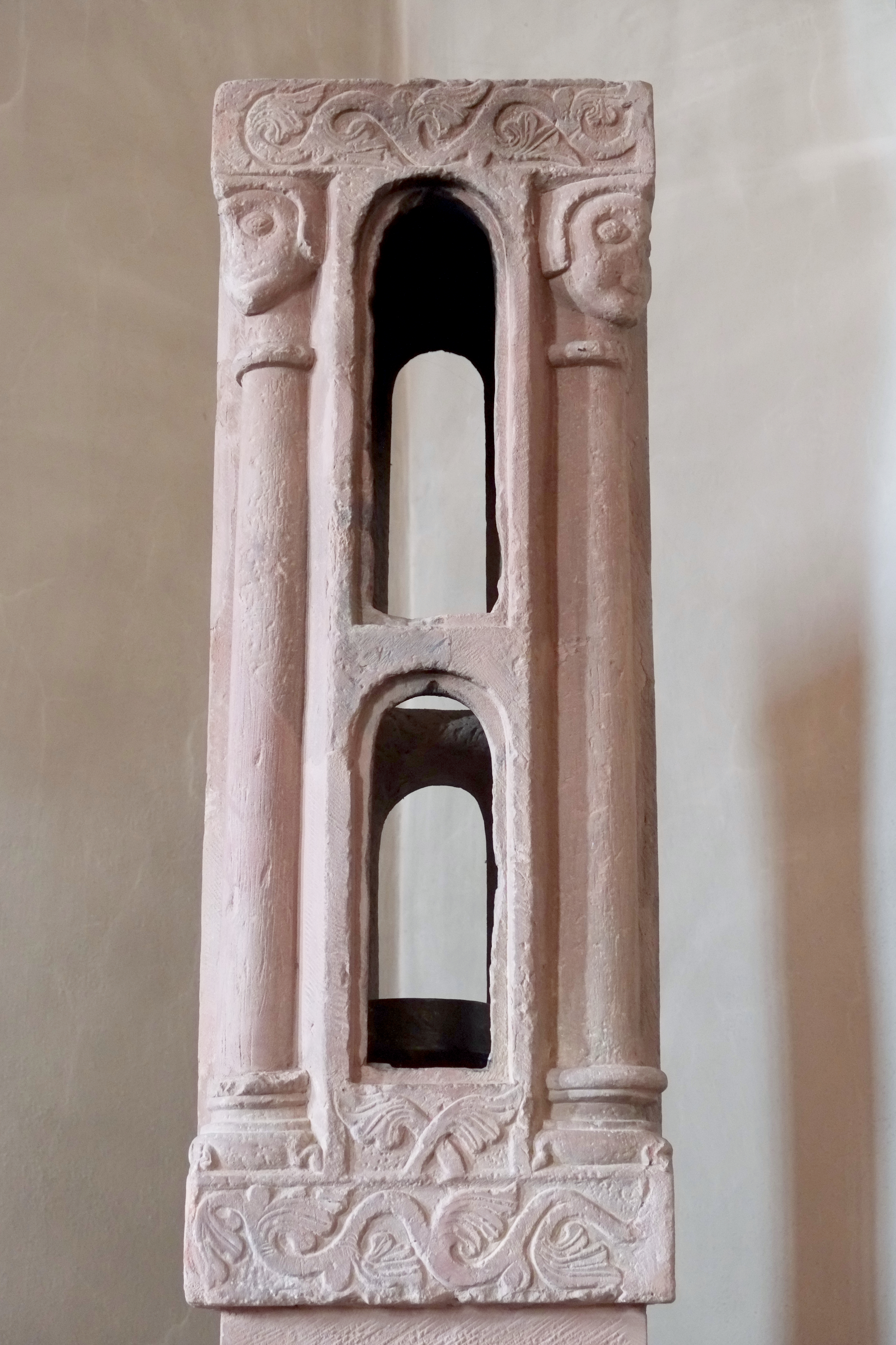 Totenleuchte in der katholischen Pfarrkirche St. Andreas in Karlstadt im Main-Spessart-Kreis (Bayern, Deutschland)